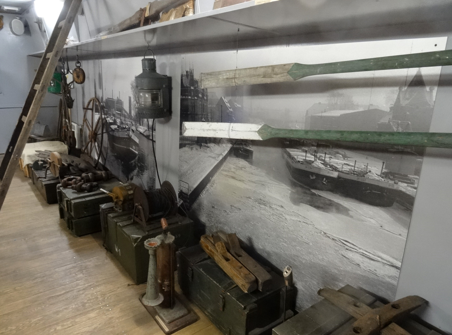 Wnętrze barki Lemara w Bydgoszczy, muzeum tradycji wodniackich i szyperskich